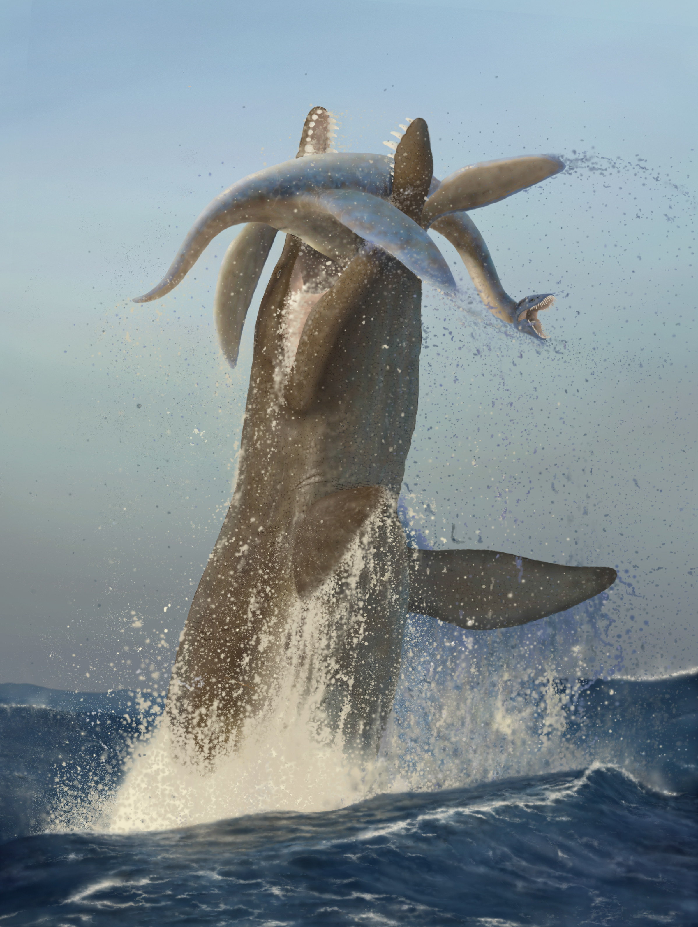 En aguas neozelandesas del Cretácico, el pliosaurio Kronosaurus atrapa desde las profundidades a un joven e inexperto Tuarangisaurus, un elasmosaurio coetáneo del depredador atacante. Kronosaurus, un reptil marino con un tamaño estimado de 10 metros, tenía una dentadura muy particular de dientes cónicos, cuyas dentelladas se han registrado en restos fósiles del también reptil marino Tuarangisaurus, un piscívoro con un tamaño adulto estimado en unos 8 metros. En la ilustración y en la descripción, se maneja como una de las posibilidades de ataque y caza la misma táctica que utilizan grandes carnívoros acuáticos actuales, como el gran tiburón blanco: a gran velocidad desde abajo, fuera del campo visual de la presa y con una fuerte mordida.